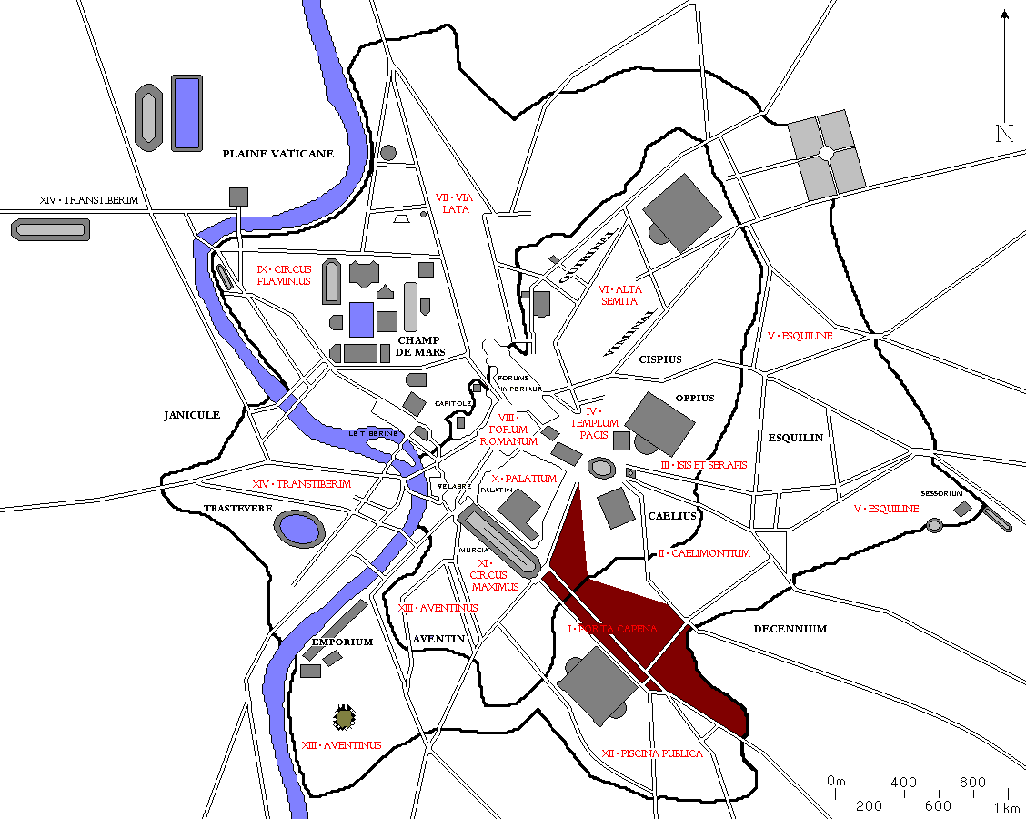 Plan de Rome avec la première régions des 14 régions d'Auguste